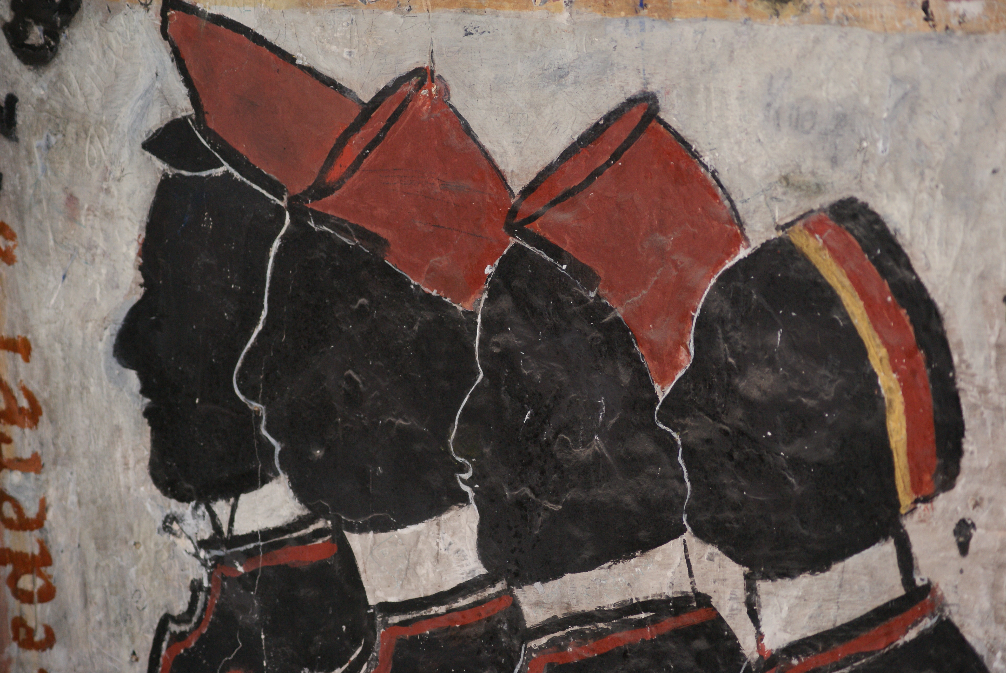 Heidelberger Karzer Motiv Frankonia Heidelberg